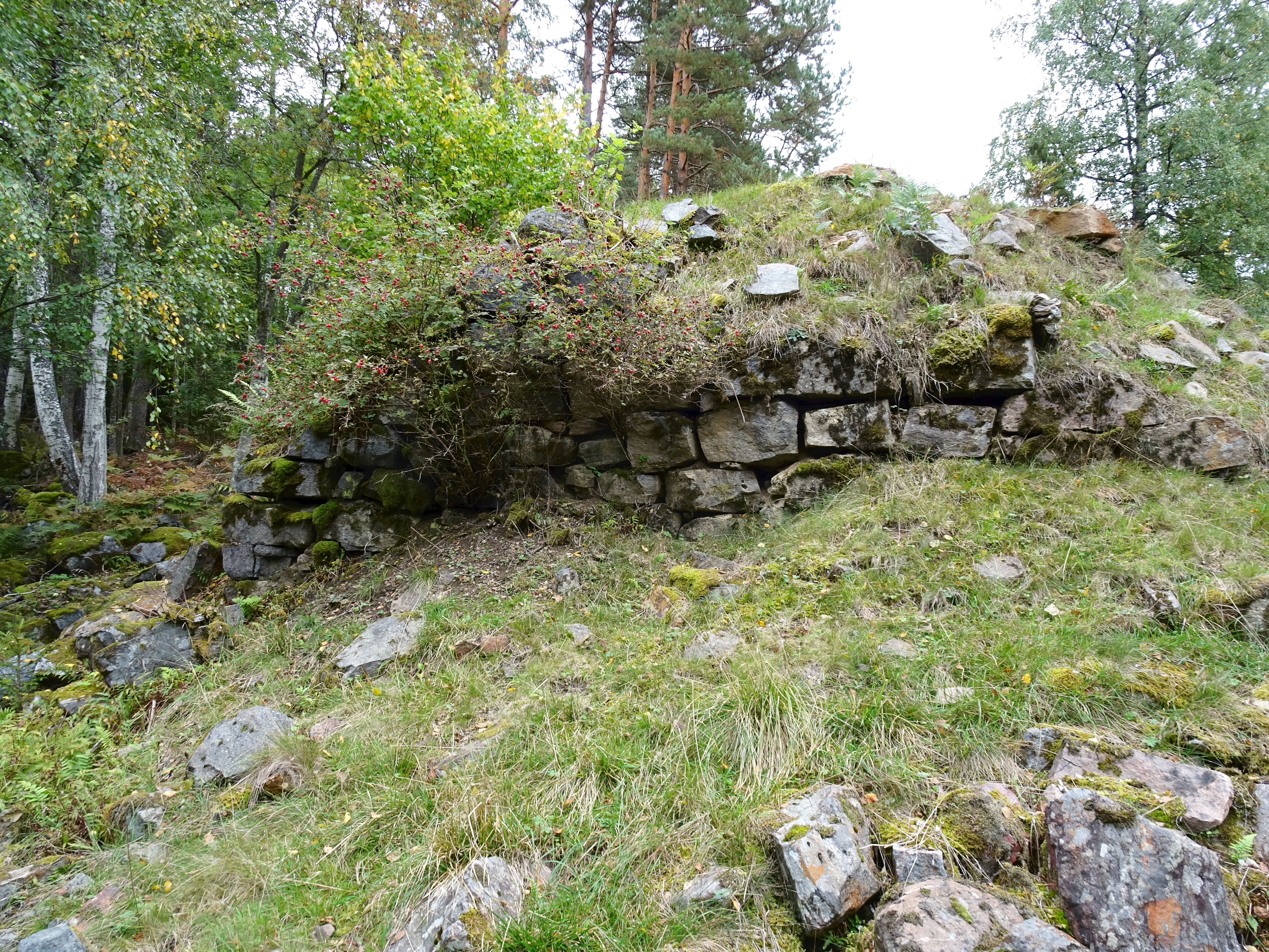 Öllösa masugn, ruin